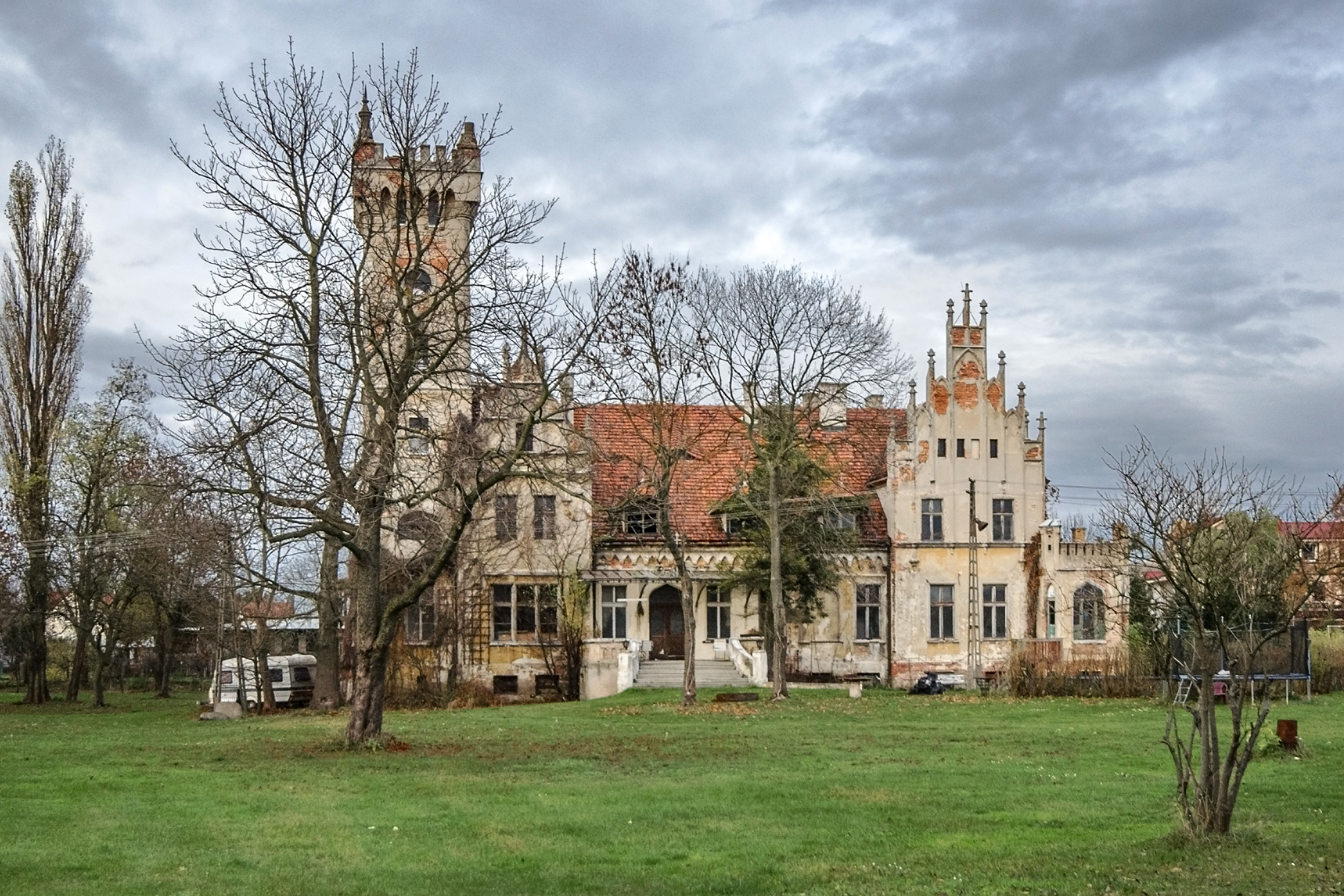 Pęgów, pałac, XIX/XX